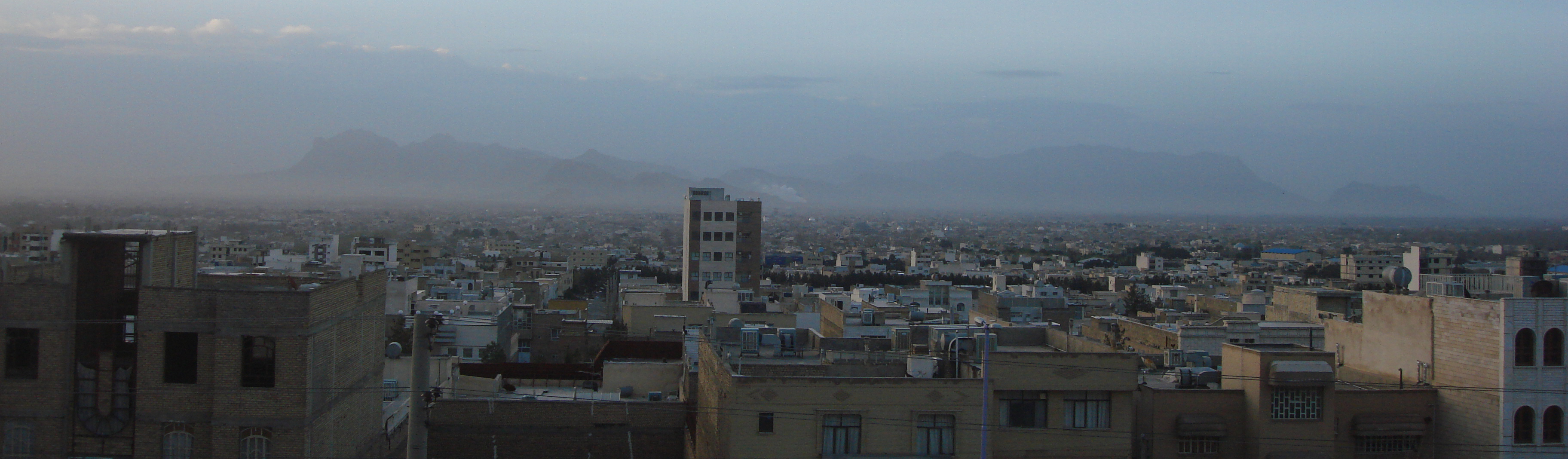 نمای بالایی خمینی شهر